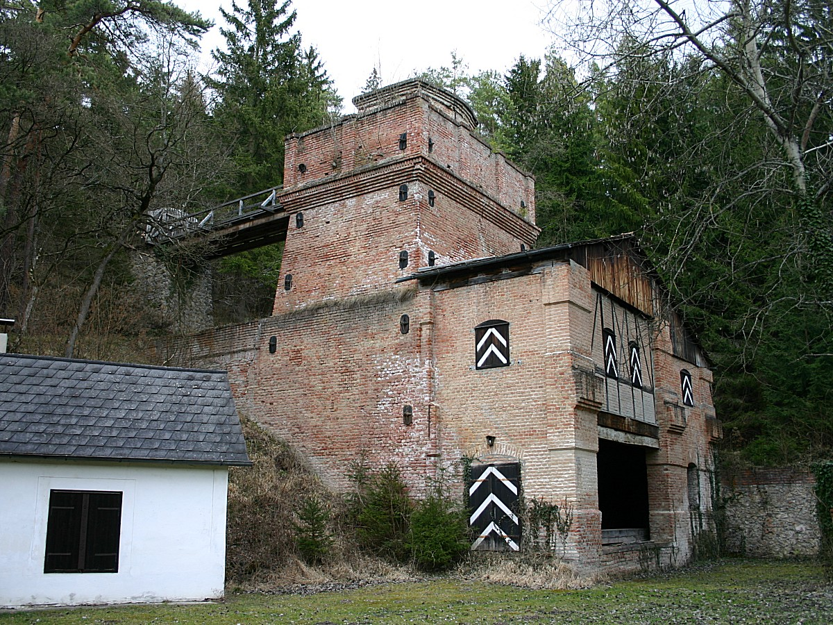 Erlach (Niederösterreich) Kalkbrennofen